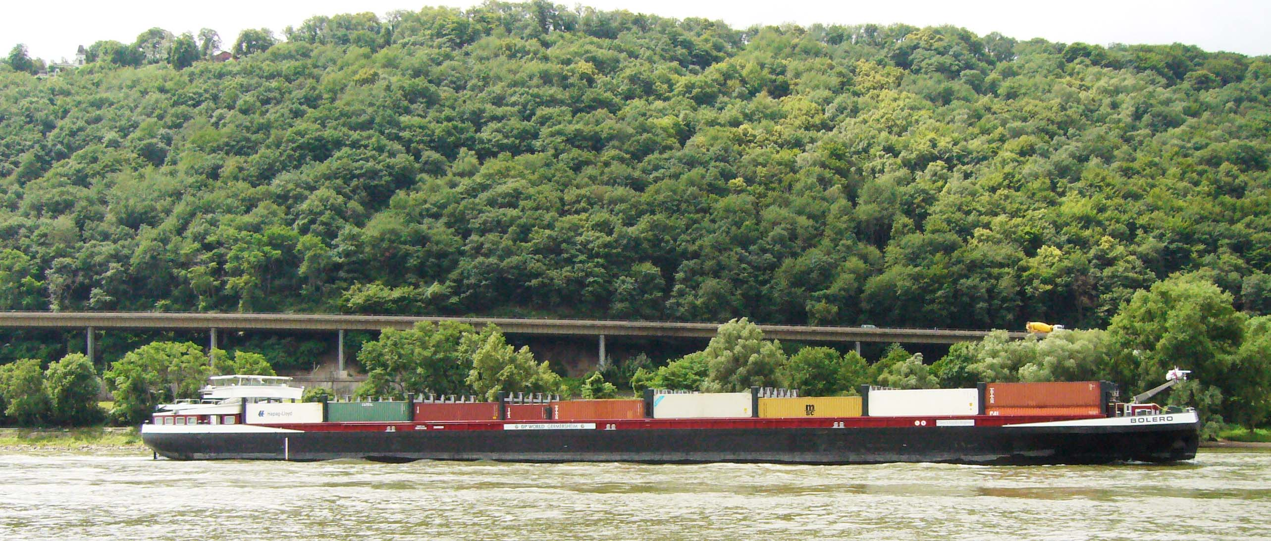 MCS Bolero